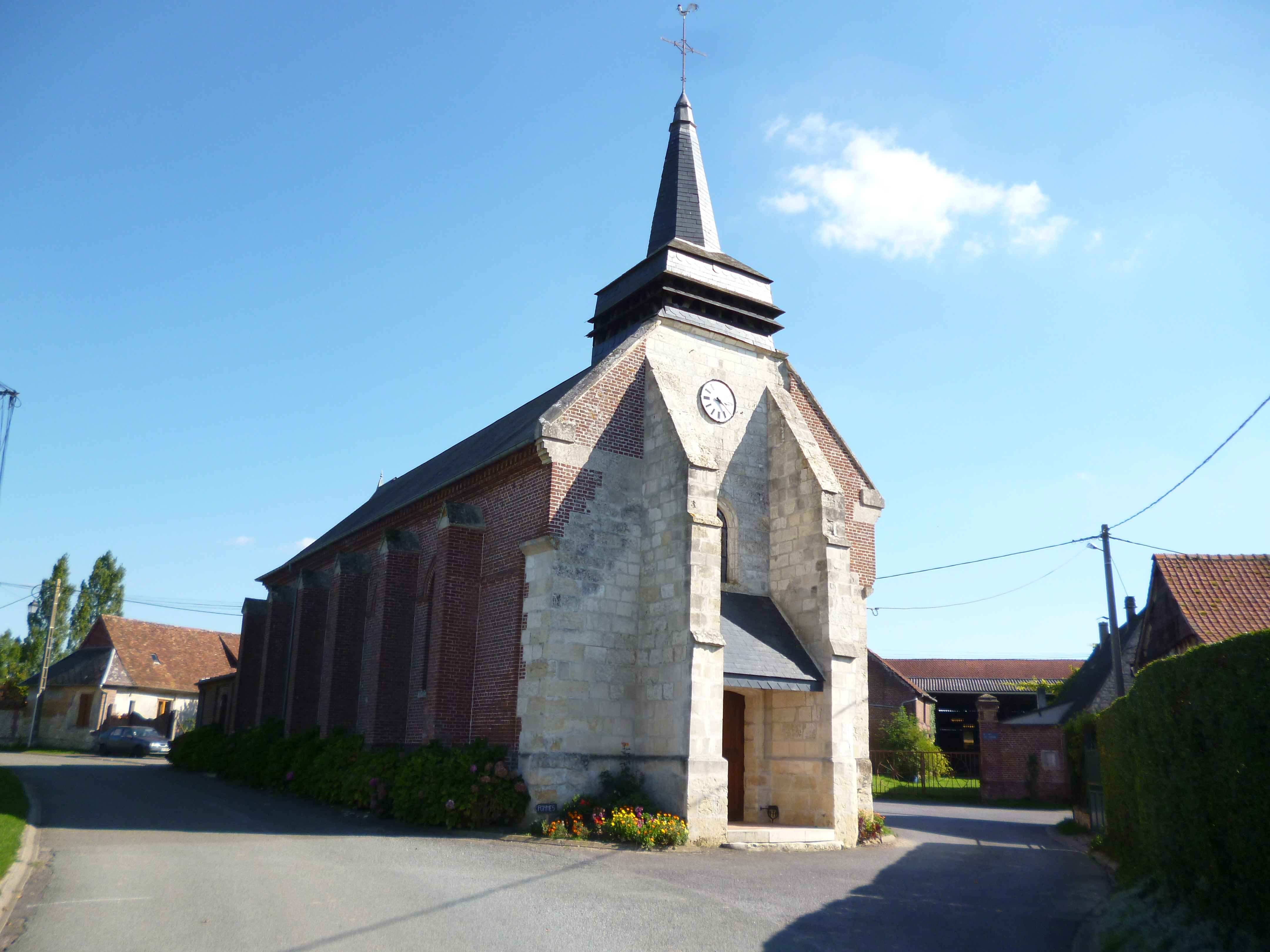 Eglise Saint-Vincent de la commune du Plessier-sur-Bulles (Oise).